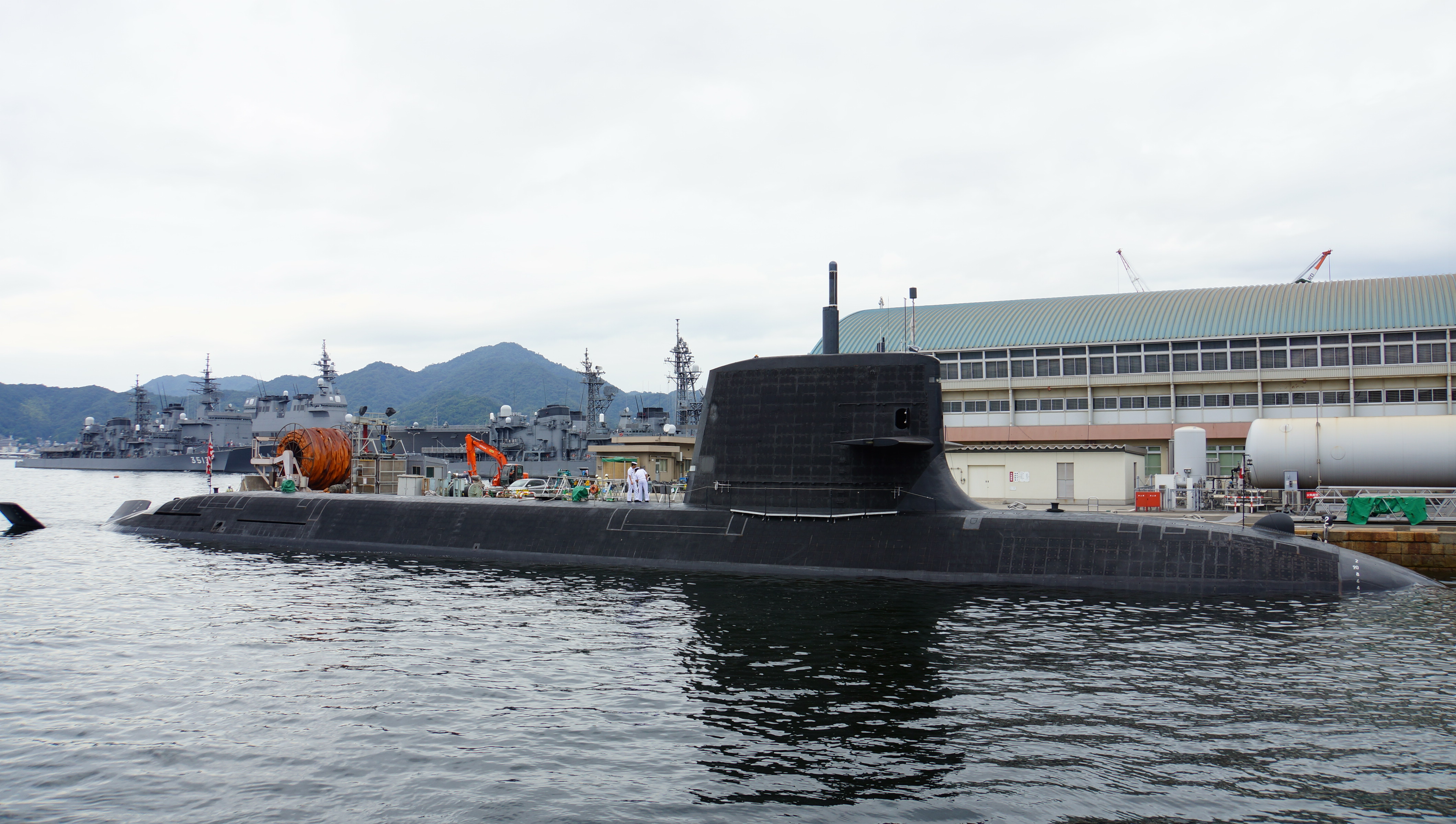 海上自衛隊 潜水艦うんりゅう（SS-502）。 14年9月15日 呉基地にて。